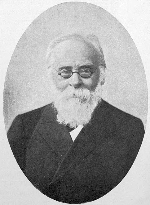 Иван Александрович Стебут (1833—1923) — заслуженный профессор, общественный деятель, писатель и практик по сельскому хозяйству.